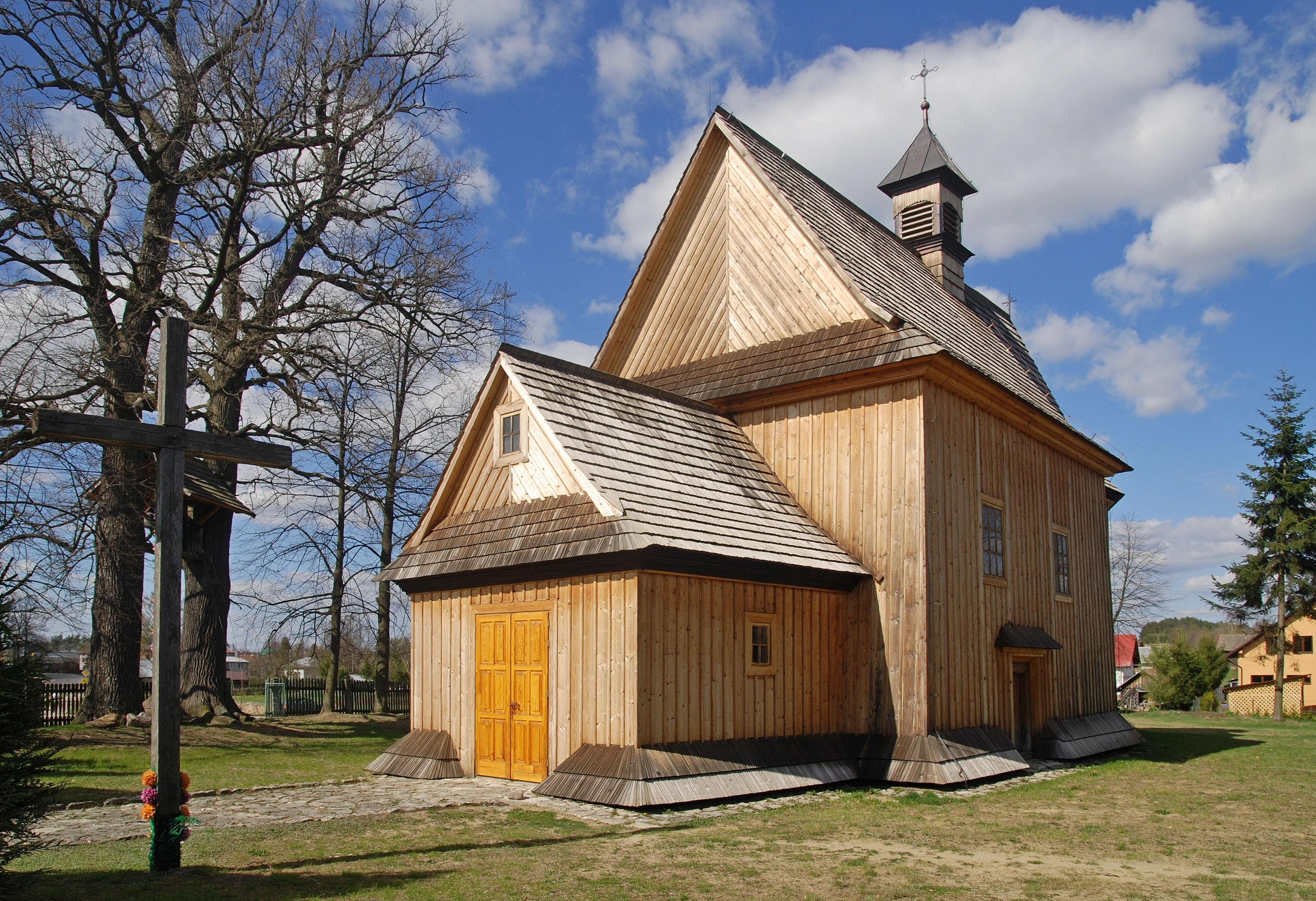 wieś Łukawiec, kościół Objawienia Pańskiego Wikidata has entry Q19886645 with data related to this item.